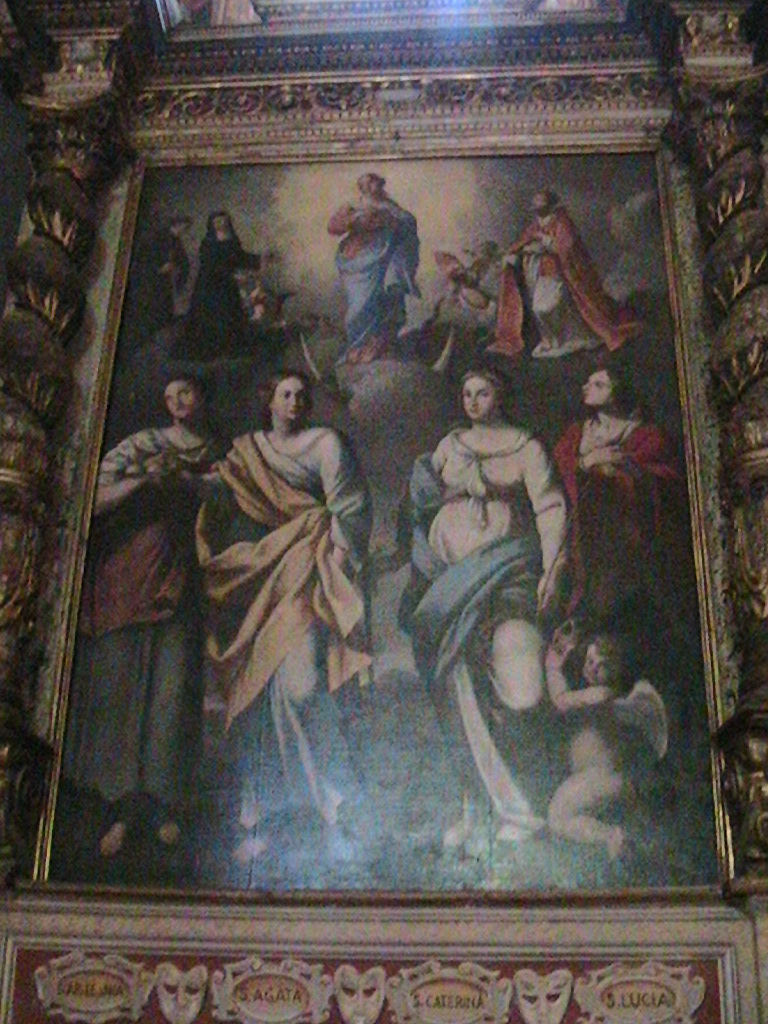 Le quattro vergini - Marco Antonio Ghislina - Chiesa parrocchiale di Bozzolo